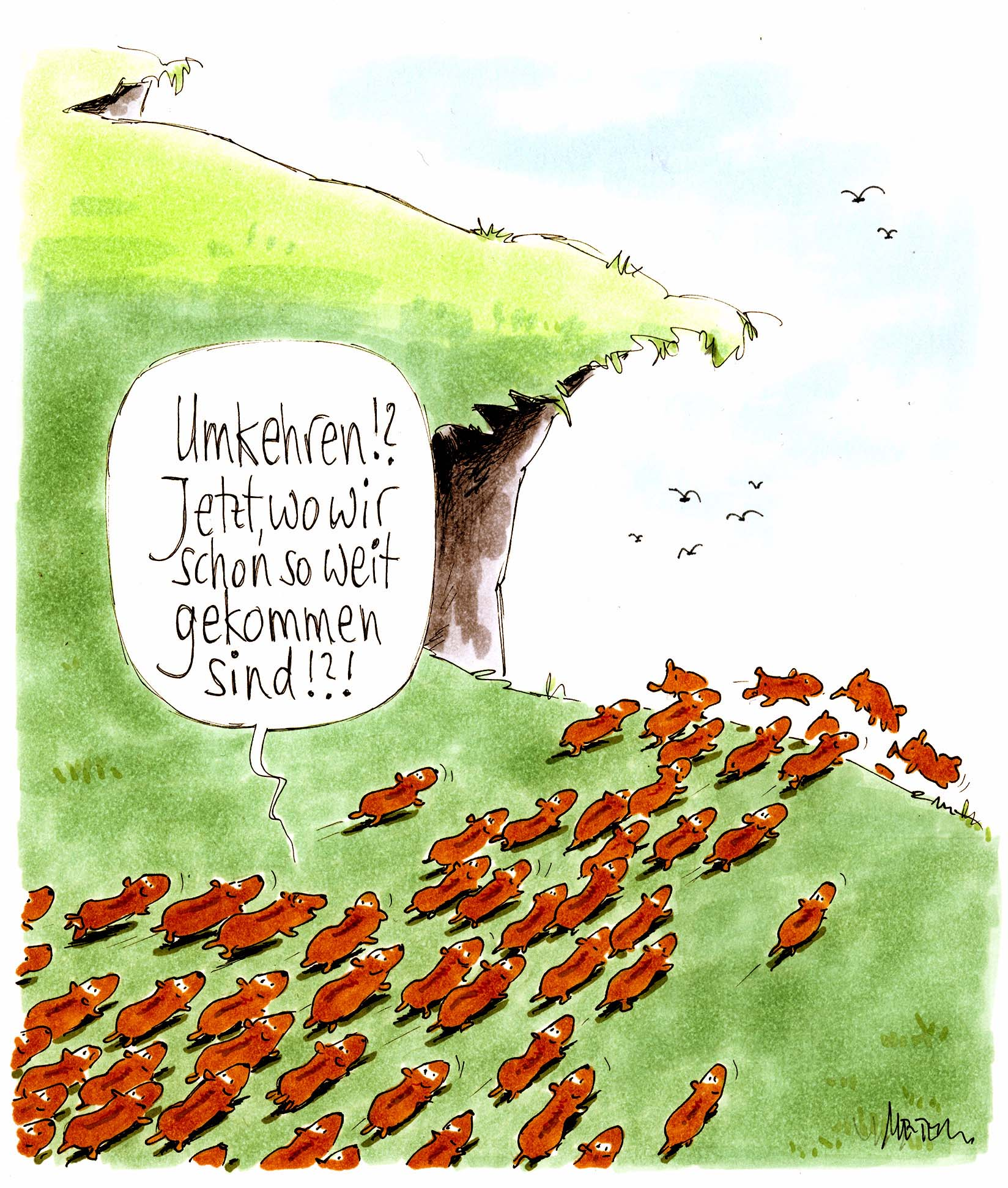 Karikatur von Gerhard Mester zum Thema: Klima und Zukunft (Stichworte: Klima, Zukunft, Lemminge, Umwelt, Umkehr, Trend) - Umkehren!? Jetzt, wo wir so weit gekommen sind!?!